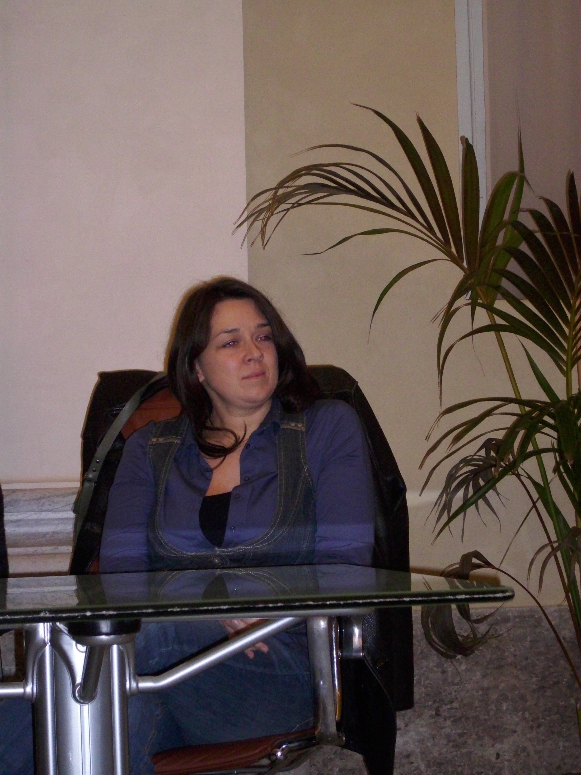 Presentazione del fumetto Greystorm della Sergio Bonelli editore a Lucca Comics 2009. Nella foto l'autrice delle chine del primo numero, Francesca Palomba.